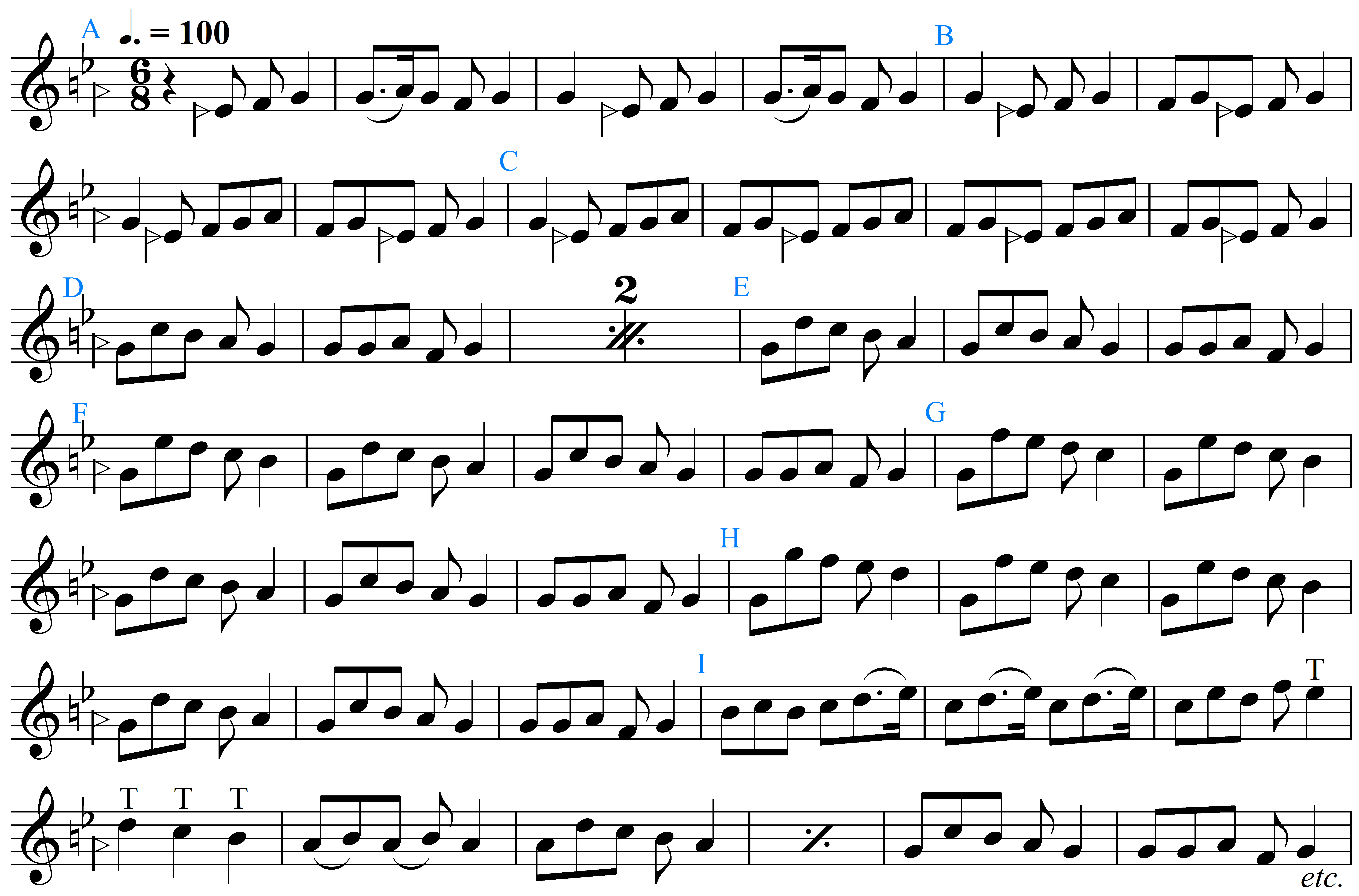 رِنگِ شهرآشوب از ردیف موسی معروفی در همایون سل